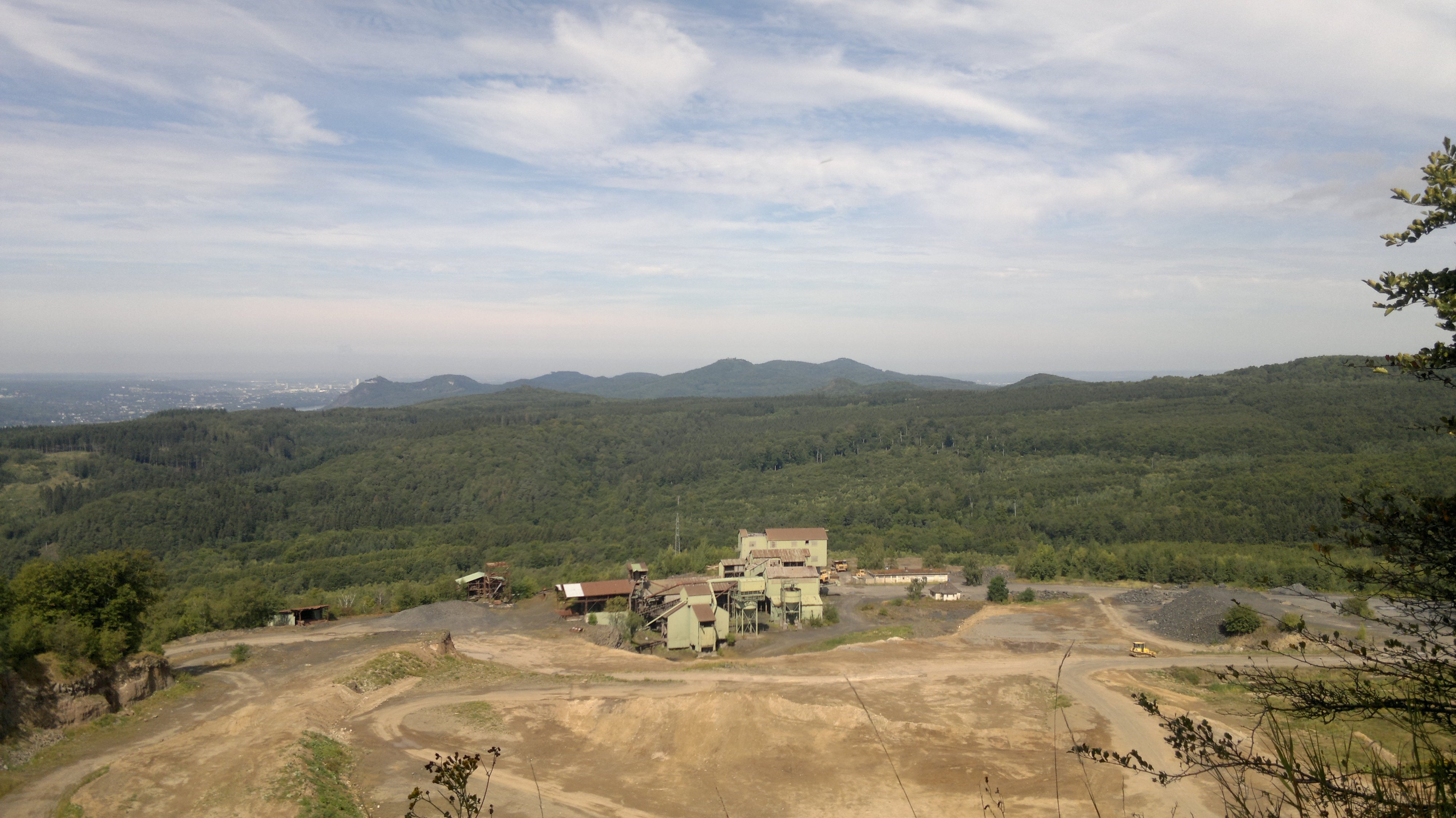 Blick vom Meerberg, dem höchsten Punkt der Stadt Linz am Rhein, zum Siebengebirge